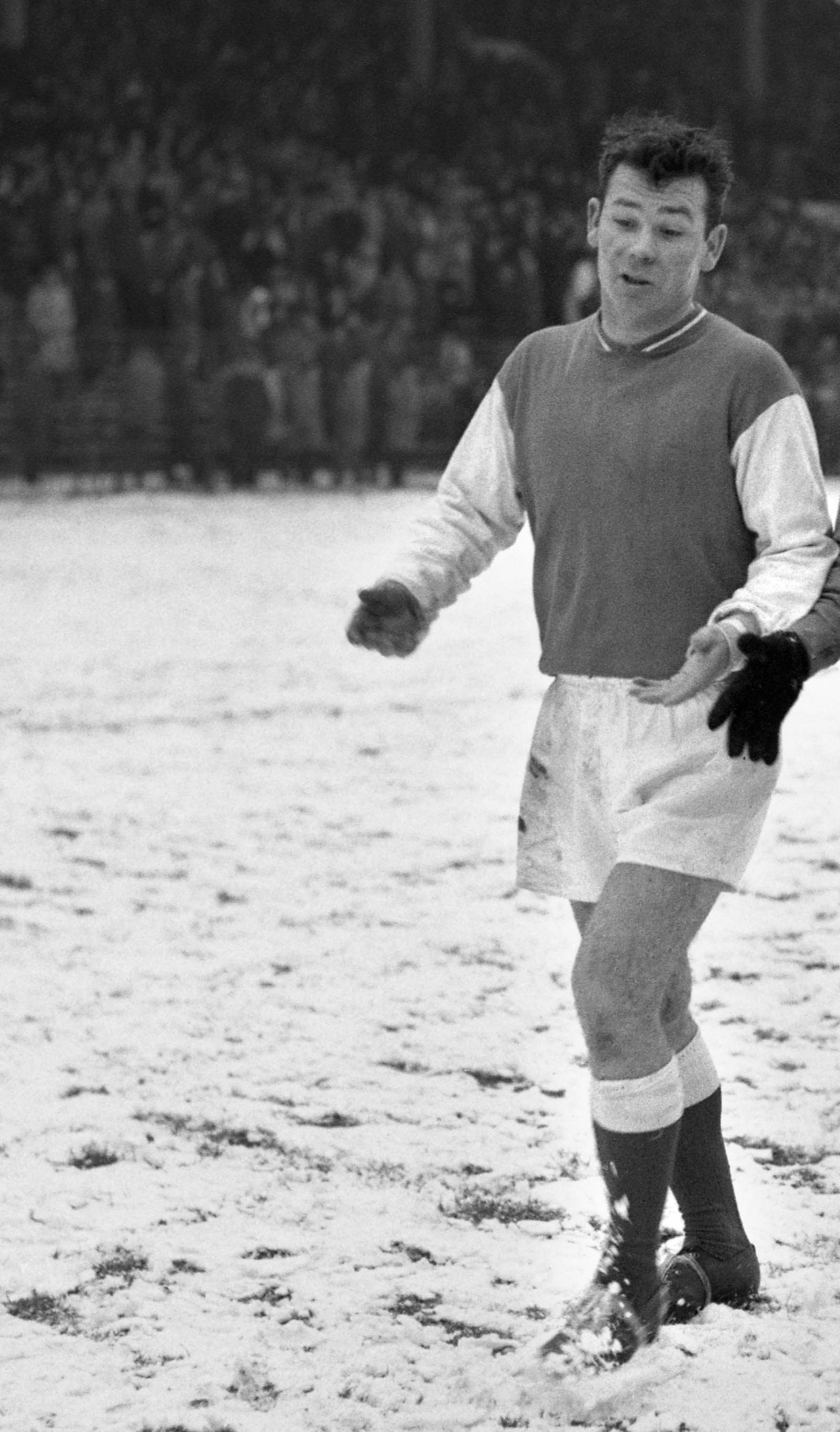 Stadium municipal de Toulouse, 1 bis allées Gabriel-Biénès. 17 Janvier 1960. Vue du rémois Just Fontaine et du défenseur toulousain Simon Czerwonka sur la pelouse enneigée du Stadium, lors du match opposant le Toulouse Football Club au Stade de Reims.